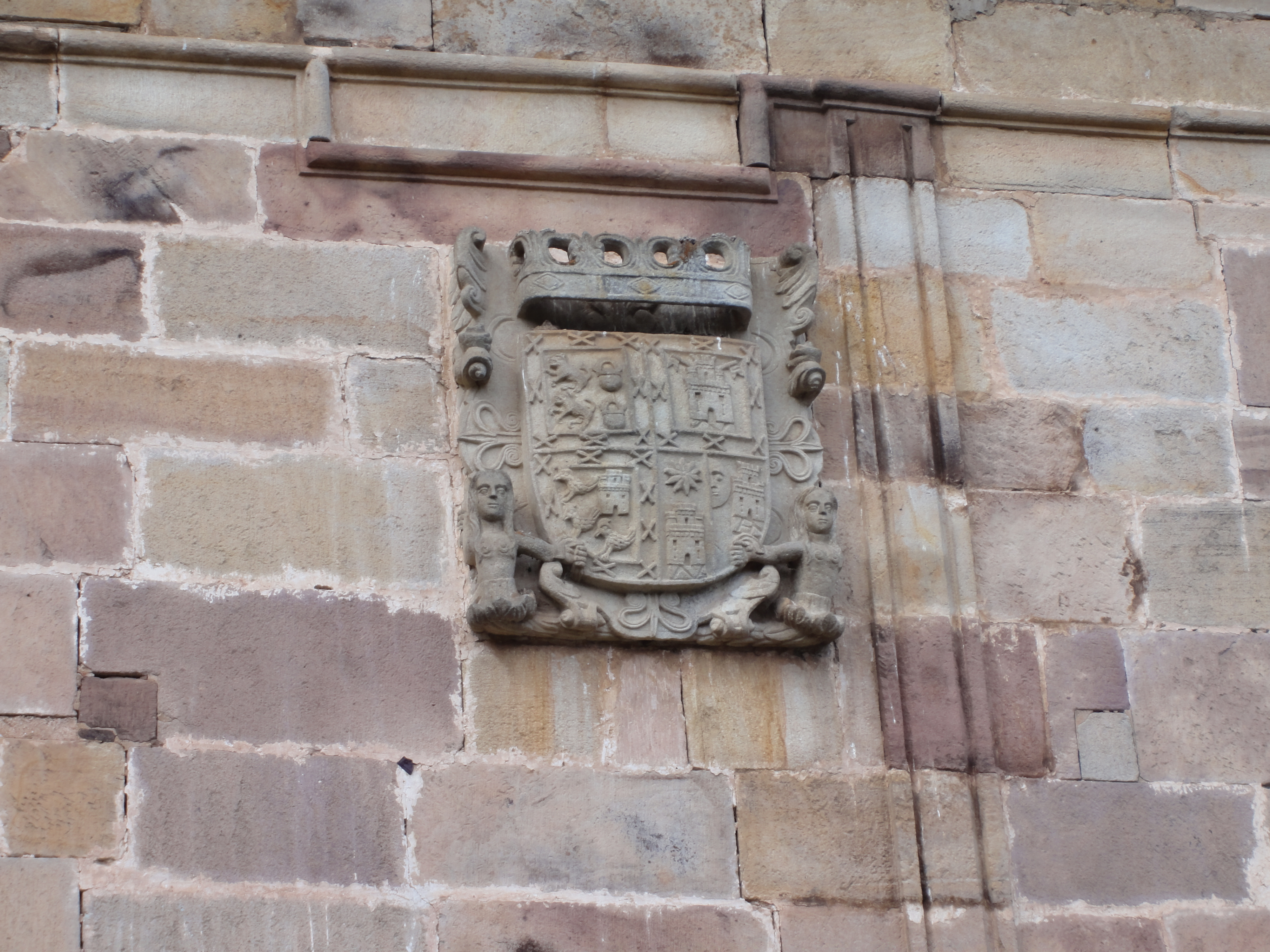 Escudo de MarÍa Jacinta Padura Moreno en Palacio Ceballos El Caballero